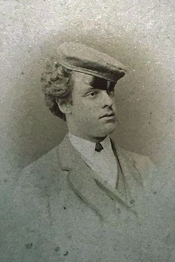 Porträtfotografie von Karl Schalk